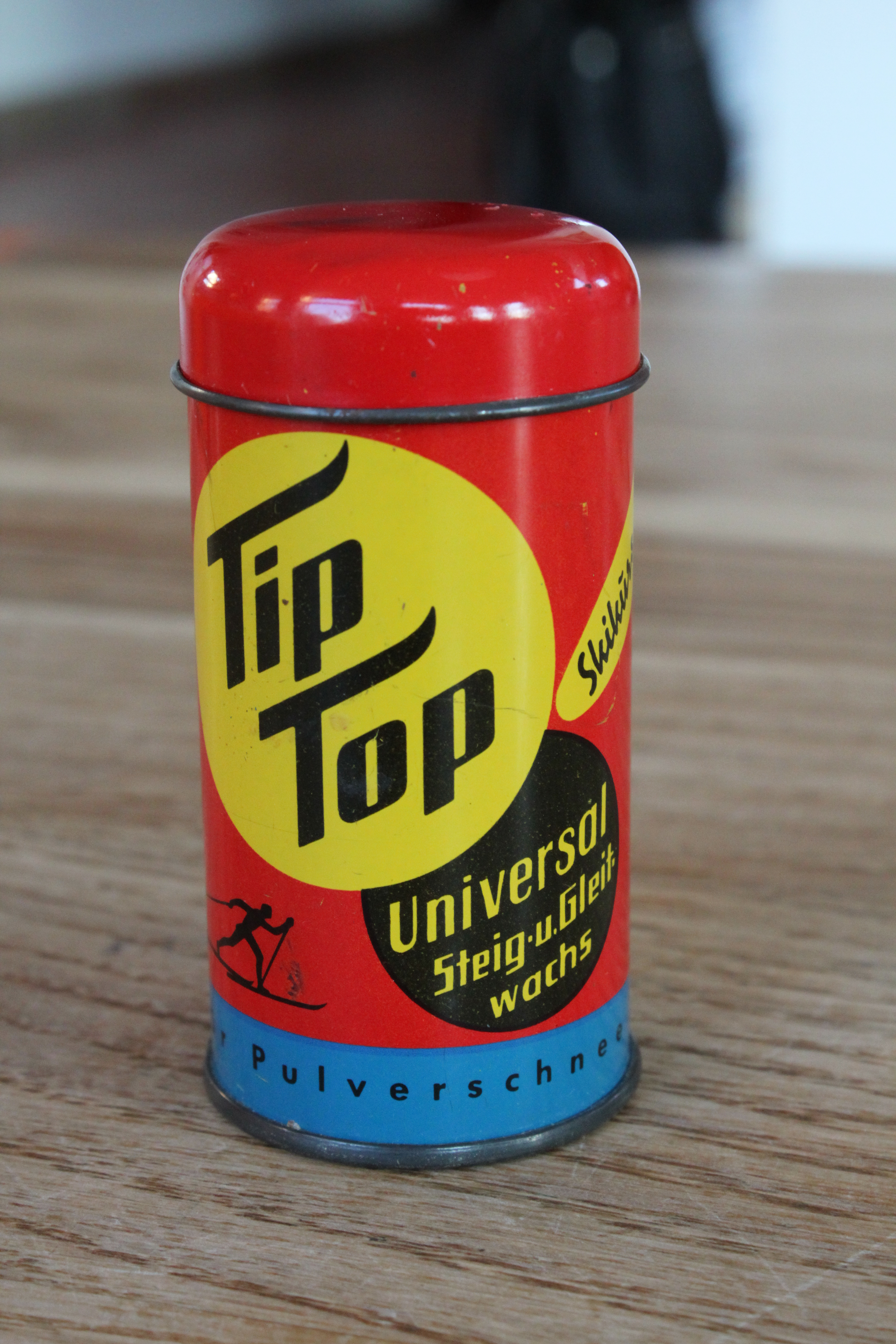 Tip-Top Skiwachs, Universal Steig- und Gleitwachs für Pulverschnee